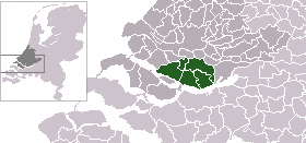 zelf gemaakt op basis van materiaal van gebruiker:Mtcv